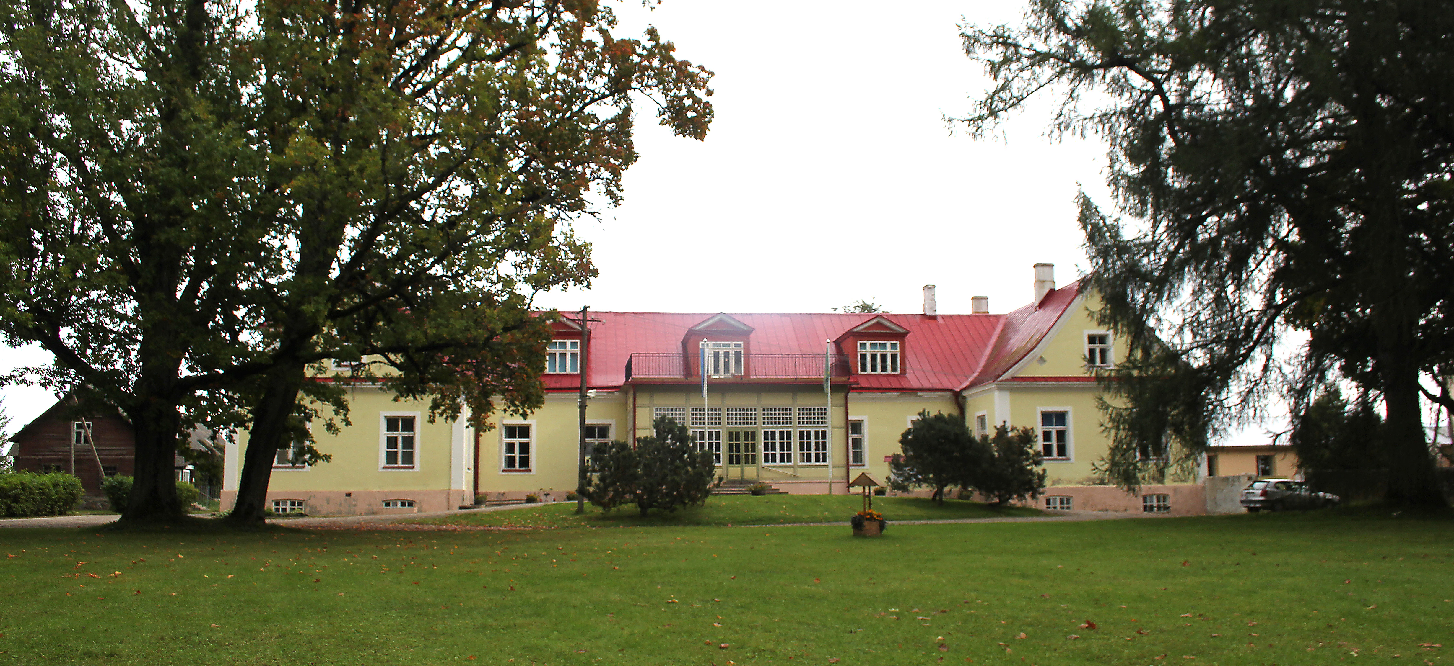 Võisiku mõisa peahoone